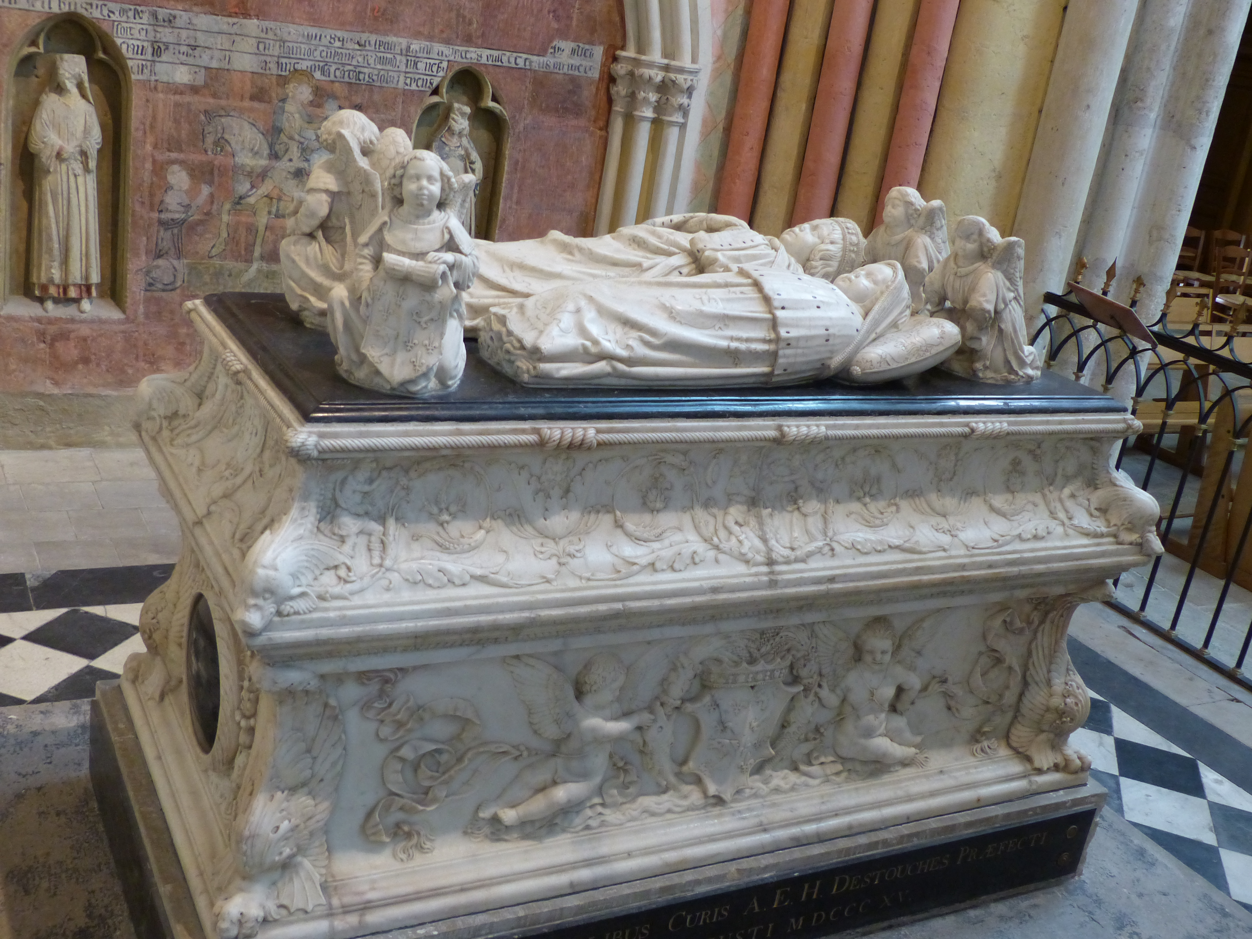 Cathédrale Saint-Gatien .